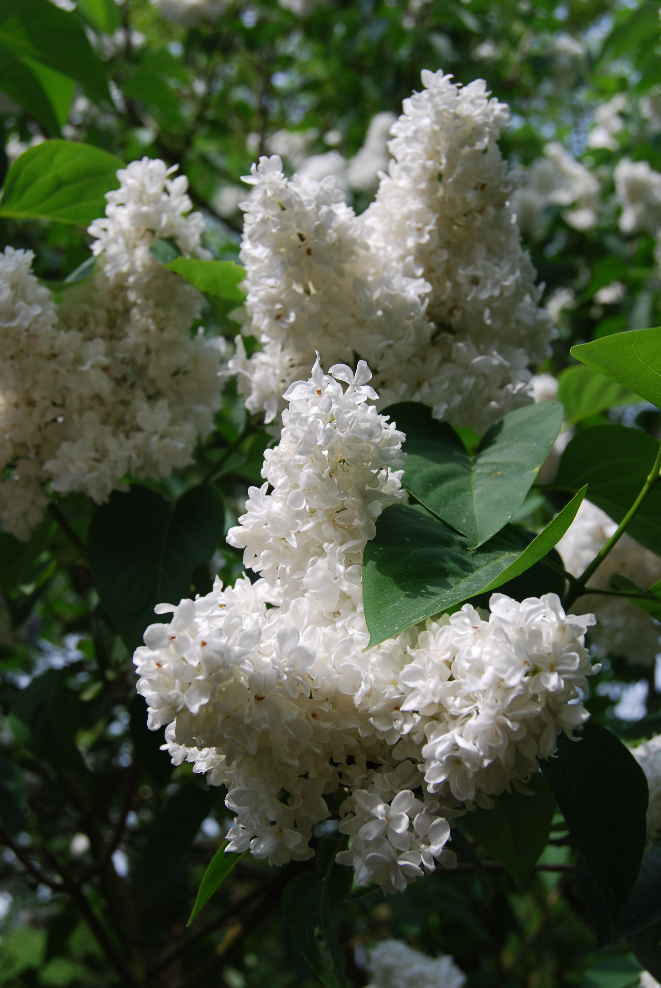 Lilas Madame Lemoine, collection patrimoine horticole lorrain